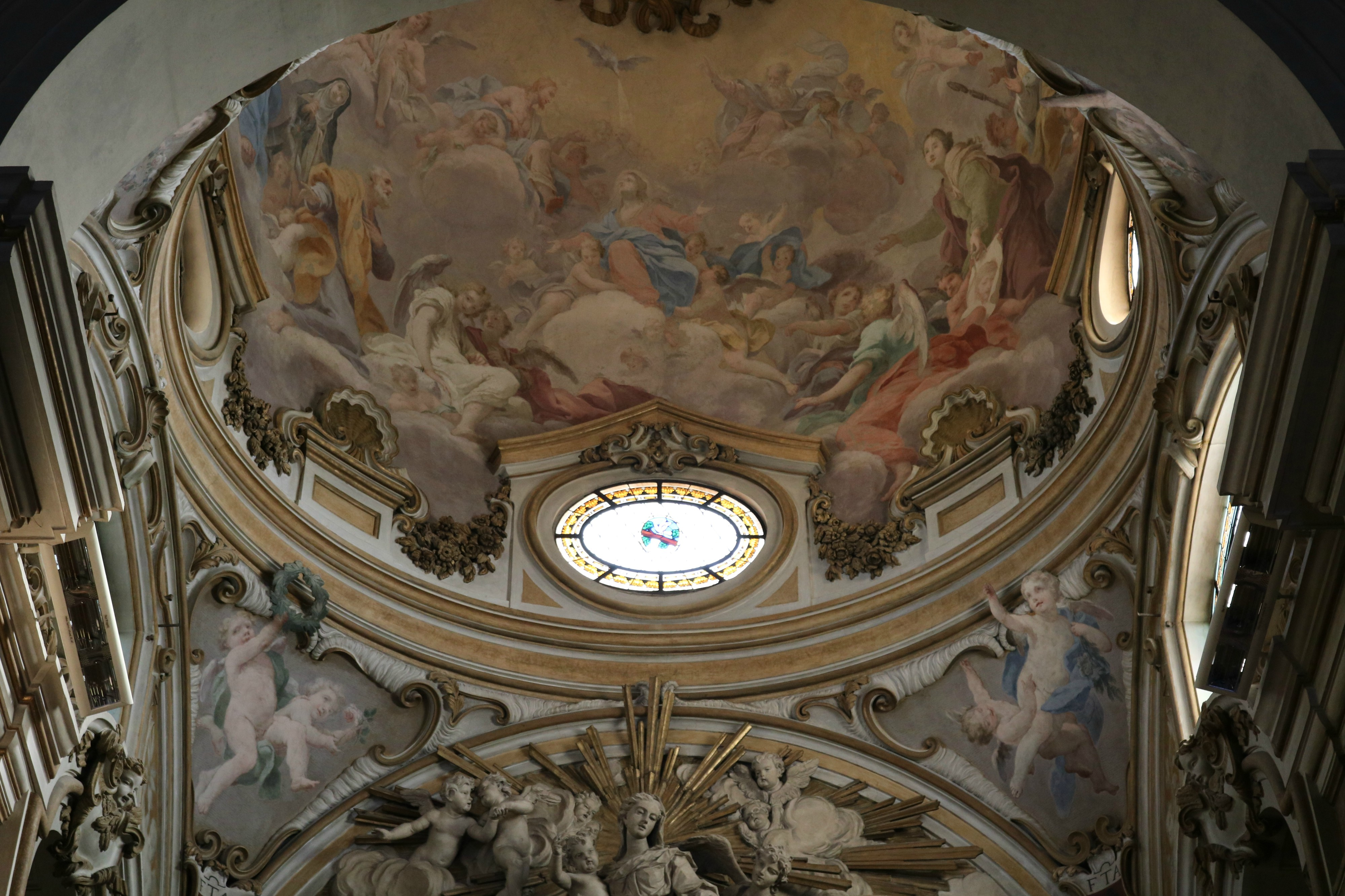 Collegiata di San Lorenzo (Montevarchi)